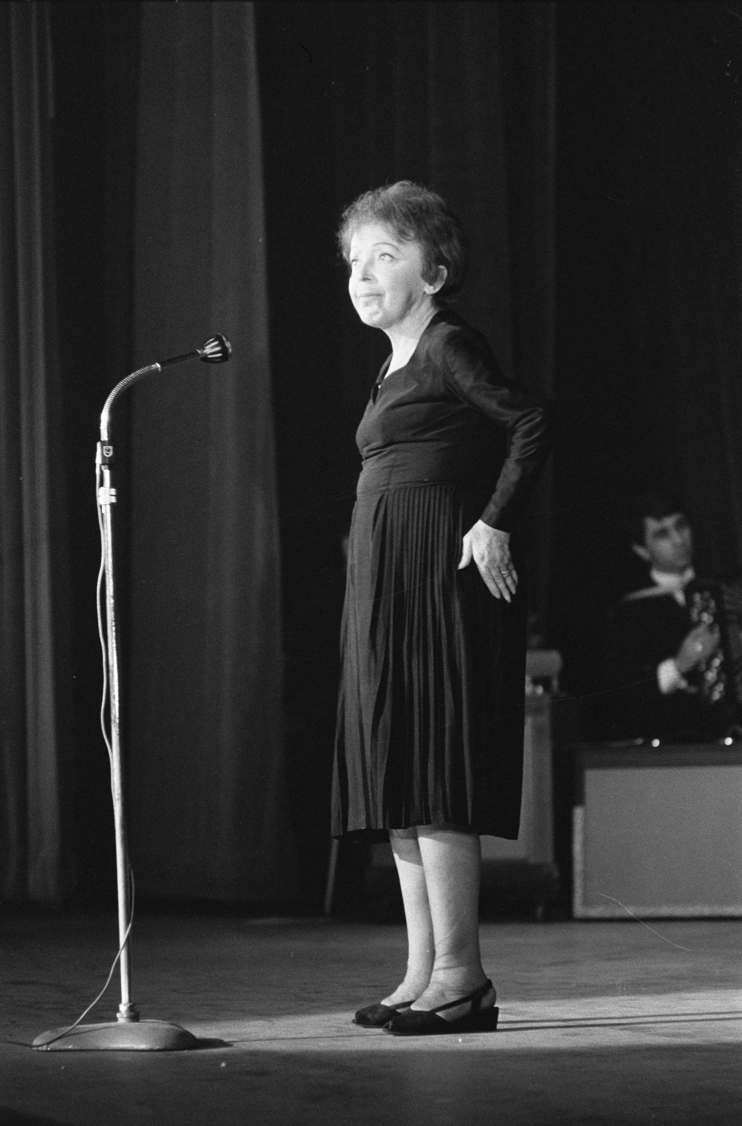 Collectie / Archief : Fotocollectie Anefo Reportage / Serie : [ onbekend ] Beschrijving : Edith Piaf zingt in ons land Datum : 13 december 1962 Locatie : Rotterdam, Zuid-Holland Trefwoorden : muziek, zangeressen Persoonsnaam : Piaf, Edith Fotograaf : Koch, Eric / Anefo Auteursrechthebbende : Nationaal Archief Materiaalsoort : Negatief (zwart/wit) Nummer archiefinventaris : bekijk toegang 2.24.01.05 Bestanddeelnummer : 914-6442